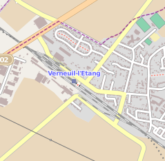 Carte de Verneuil.